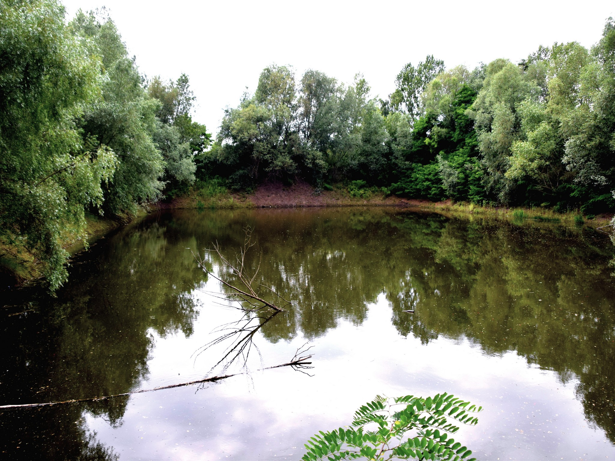 Teich an der Perleberger Straße in Frankfurt (Oder)